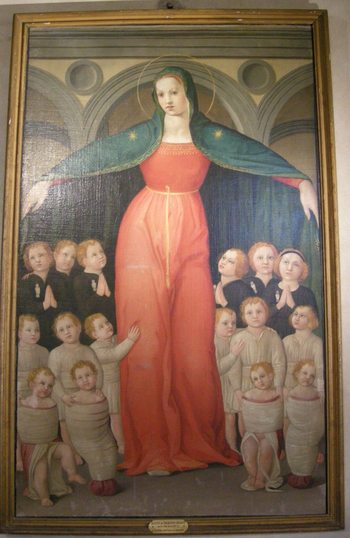 Domenico di michelino, madonna degli innocenti, 1440